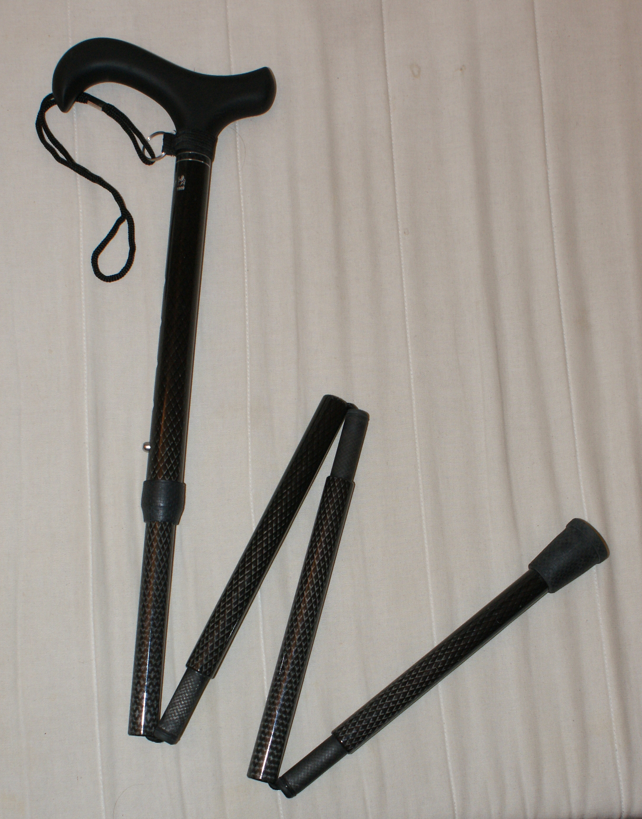 canne de marche, pliable et ajustable en hauteur, en carbone, crosse derby, avec sa dragone